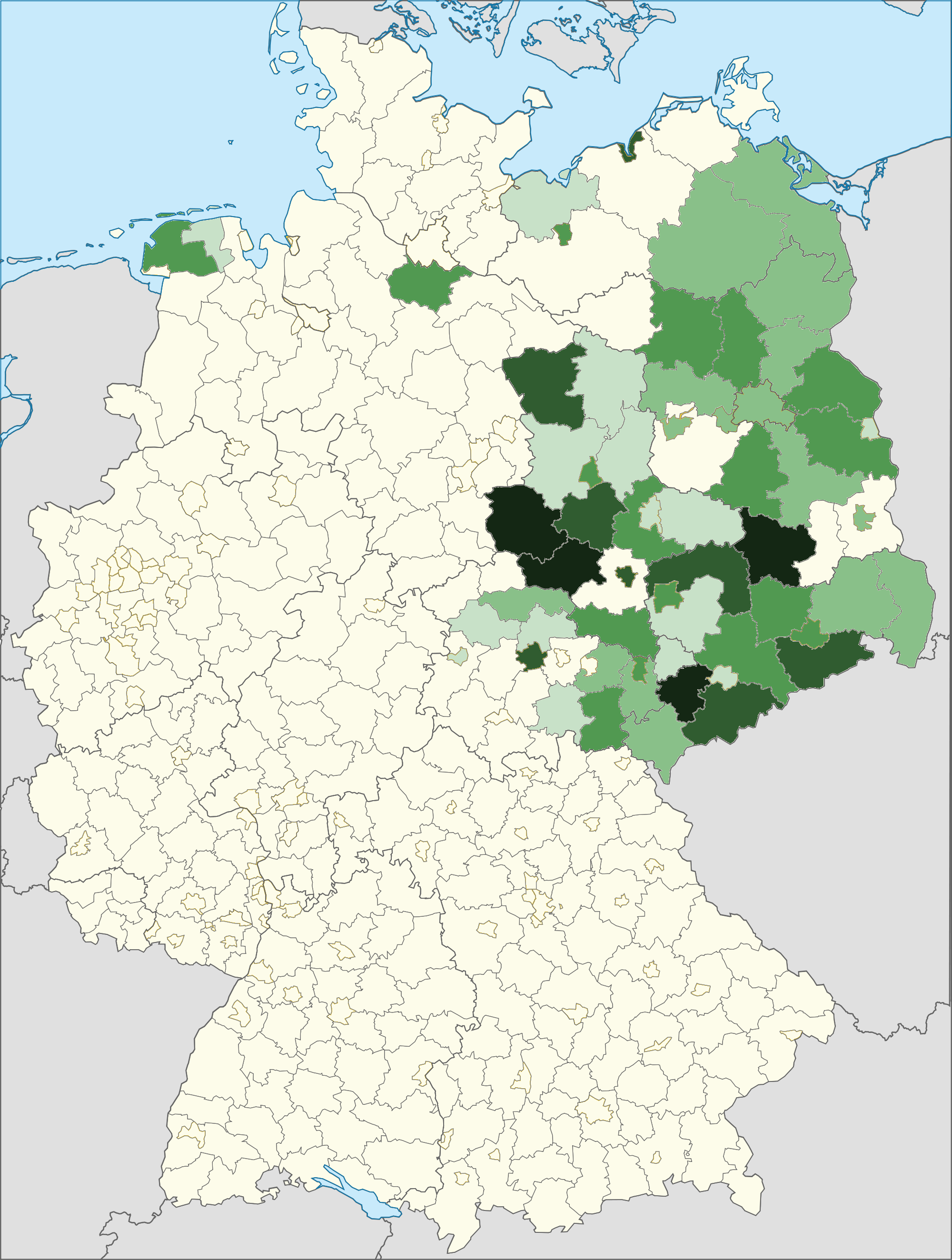 Karte der Personen mit vietnamesischer Staatsangehörigkeit und deren relativer Häufigkeit in den Landkreisen 2014. Dunkelgrün: häufigste ausländische Staatsangehörigkeit in diesem Kreis, hellgrün: fünfthäufigste ausländische Staatsangehörigkeit in diesem Kreis, weiß: sechsthäufig oder weniger. Quelle: Ausländerzentralregister, Stand 31. Dezember 2014. Saarland: keine Daten auf Kreisebene (dargestellt ist die Landesebene).